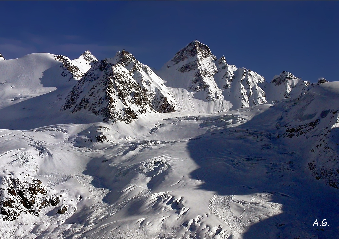 La Torre del Gran San Pietro vista dai casolari dell'Herbetet - Alpi Graie - Italy